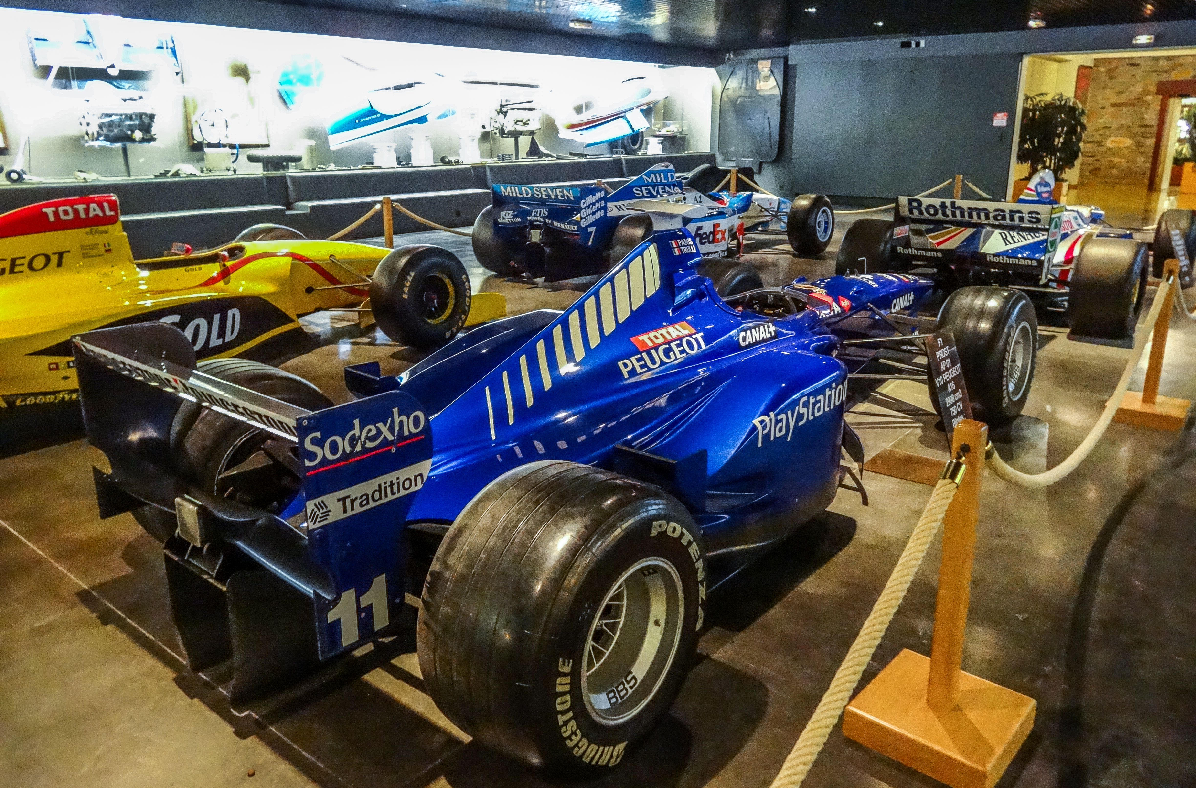 V10 3.0 765cv 505kg